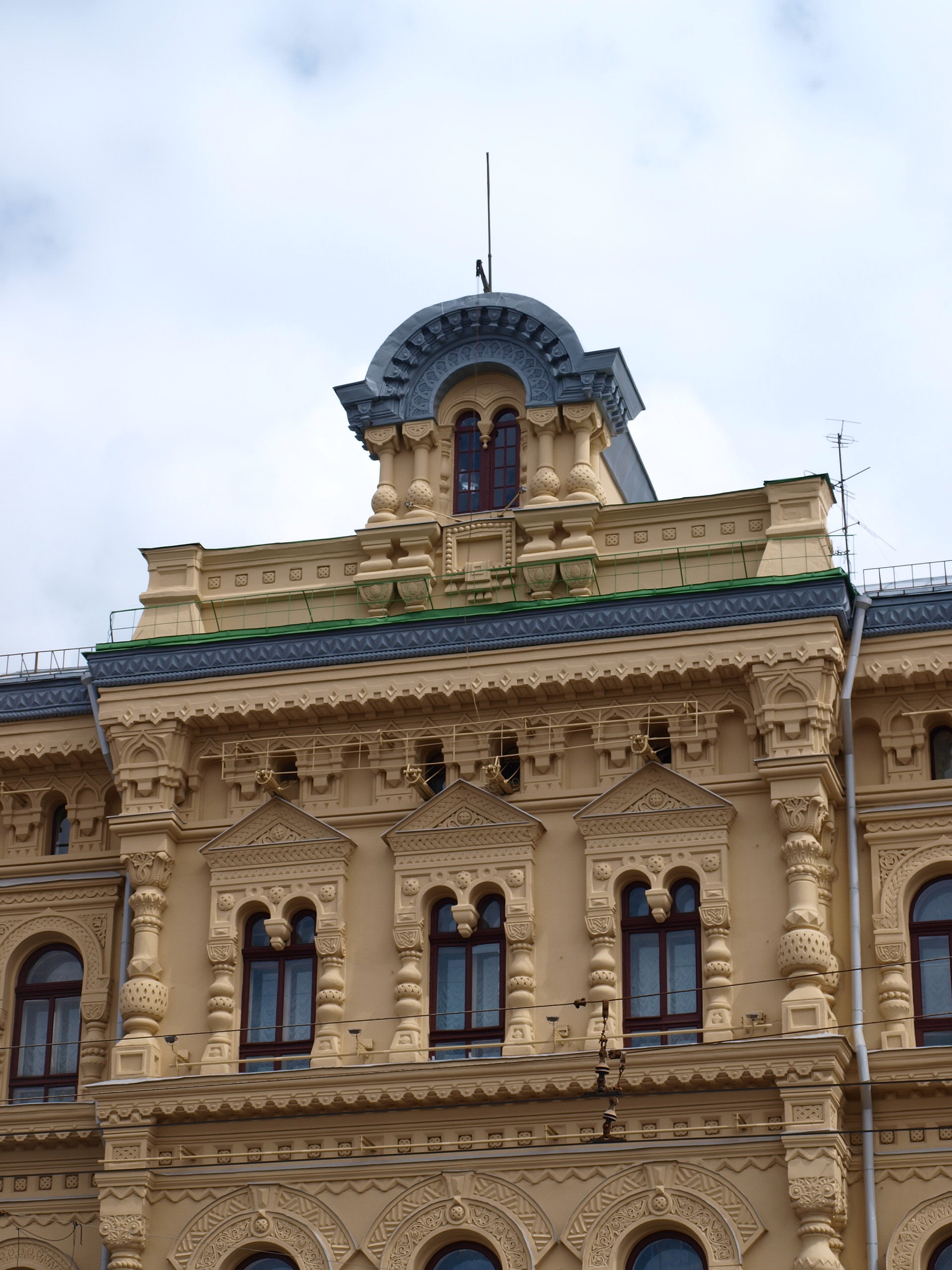 Музей Политехнический (Москва и Московская область, Москва, Новая площадь, 3-5, Политехничсекий пр., 2, Лубянский пр., 4-6)